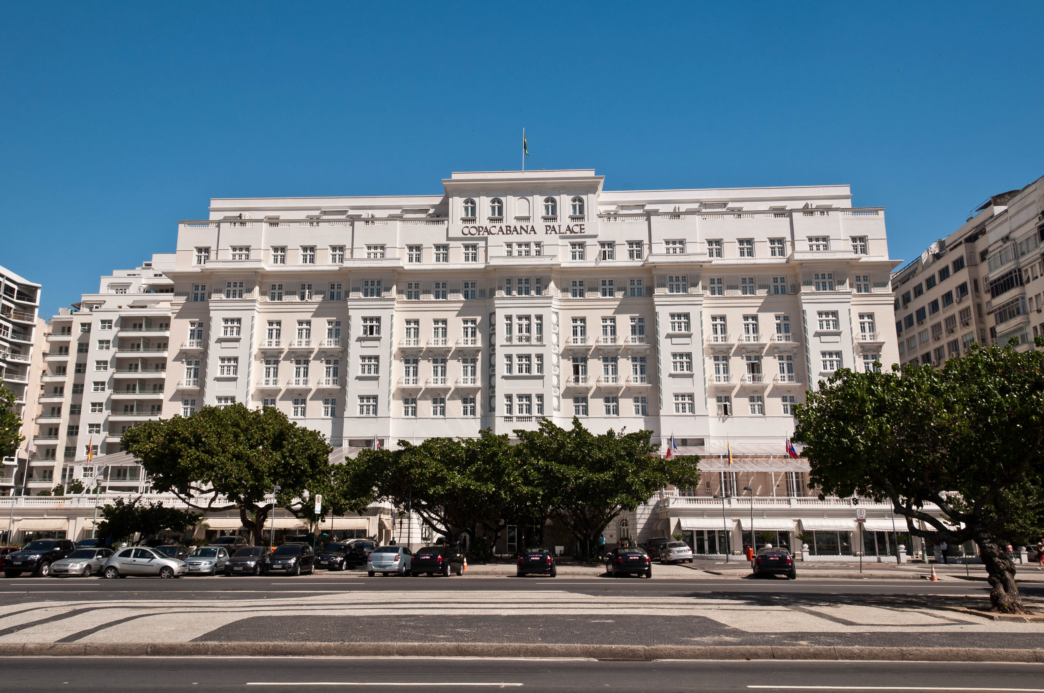 Copacabana Palace Hotel: prédio